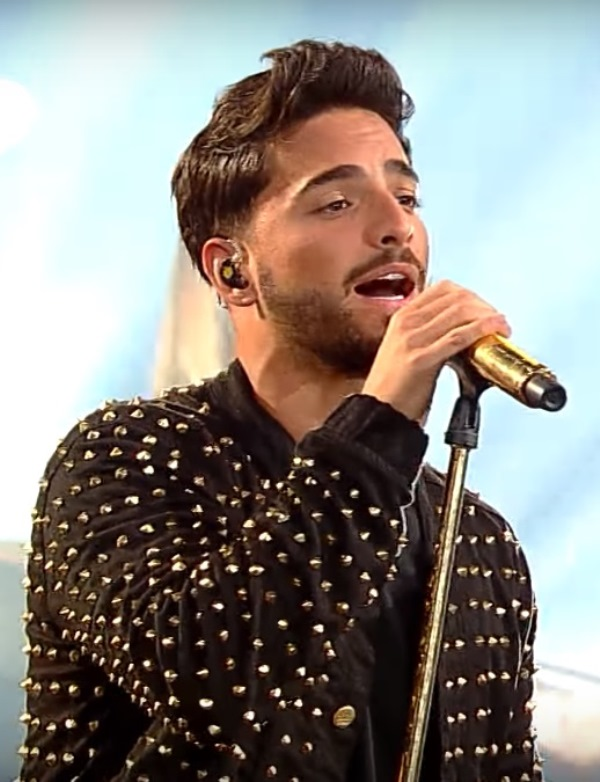 El cantante colombiano, miembro del Jurado Internacional del 58° del Festival Internacional de la Canción de Viña del Mar, abre la quinta noche de Viña 2017 cautivando al público de la Quinta Vergara con sus grandes éxitos musicales. Encuentra más vídeos de la MALUMA en nuestro Canal Histórico...Recuerda, somos el Canal Histórico del Festival Internacional de la Canción de Viña del Mar.